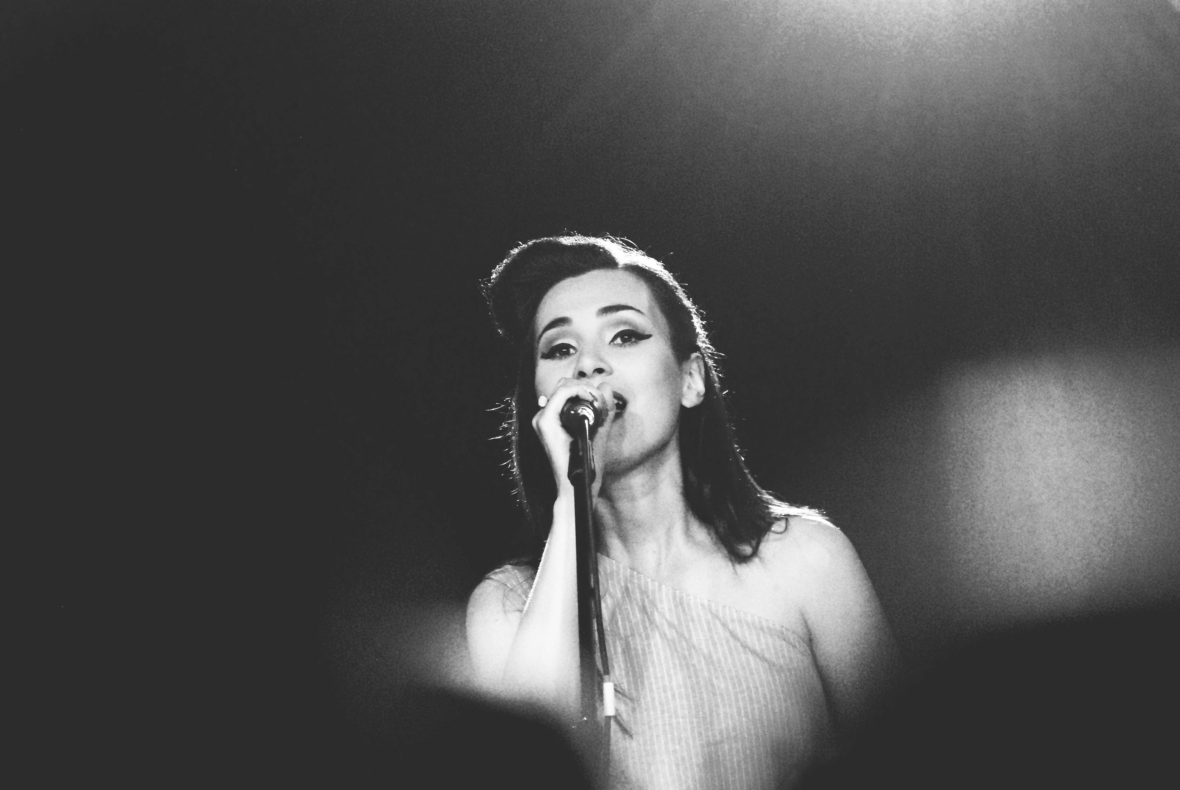 Kryhitka @ Tolstoy Гурт Крихітка